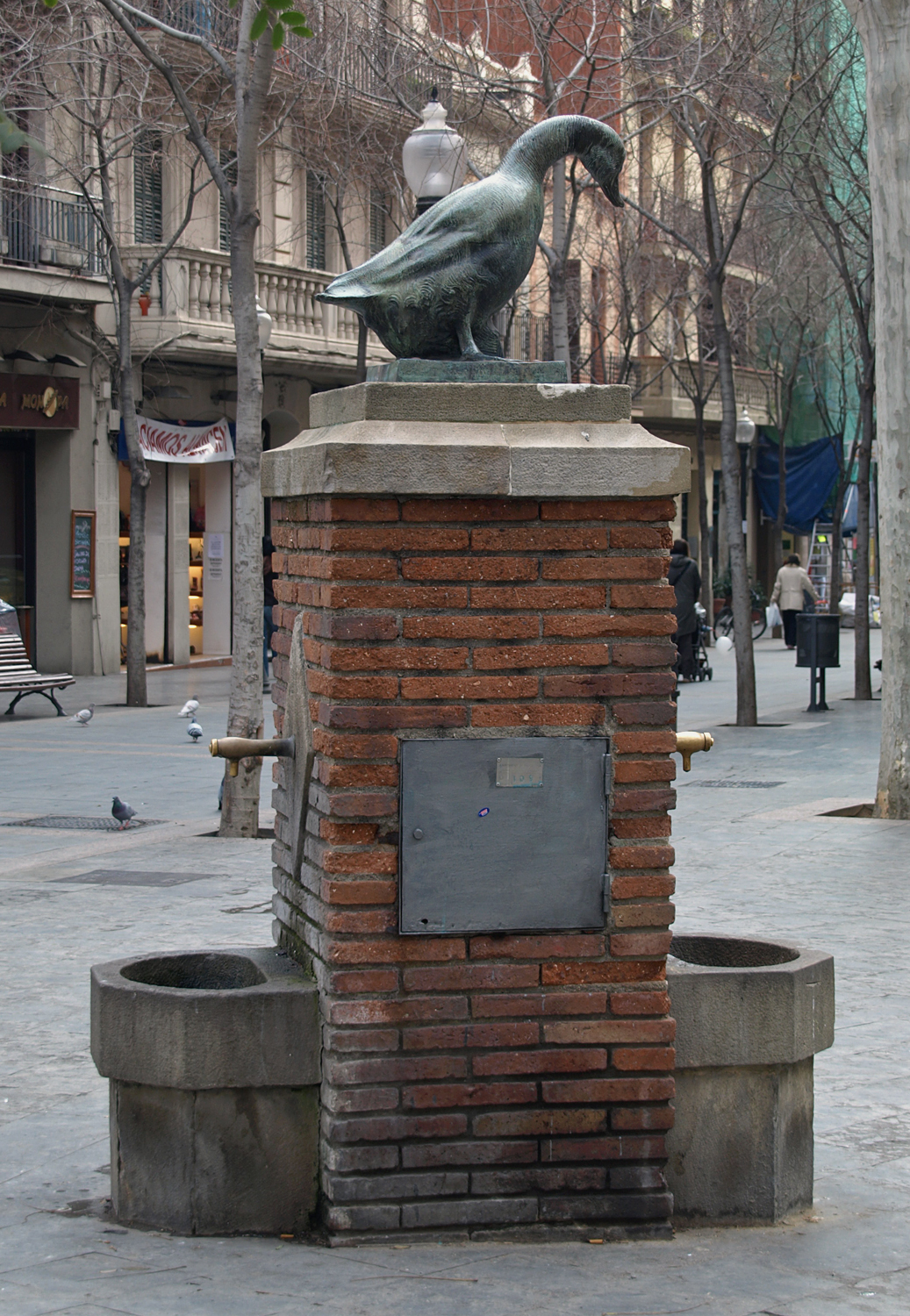 Font de l'Ànec (Frederic Marès, 1925)